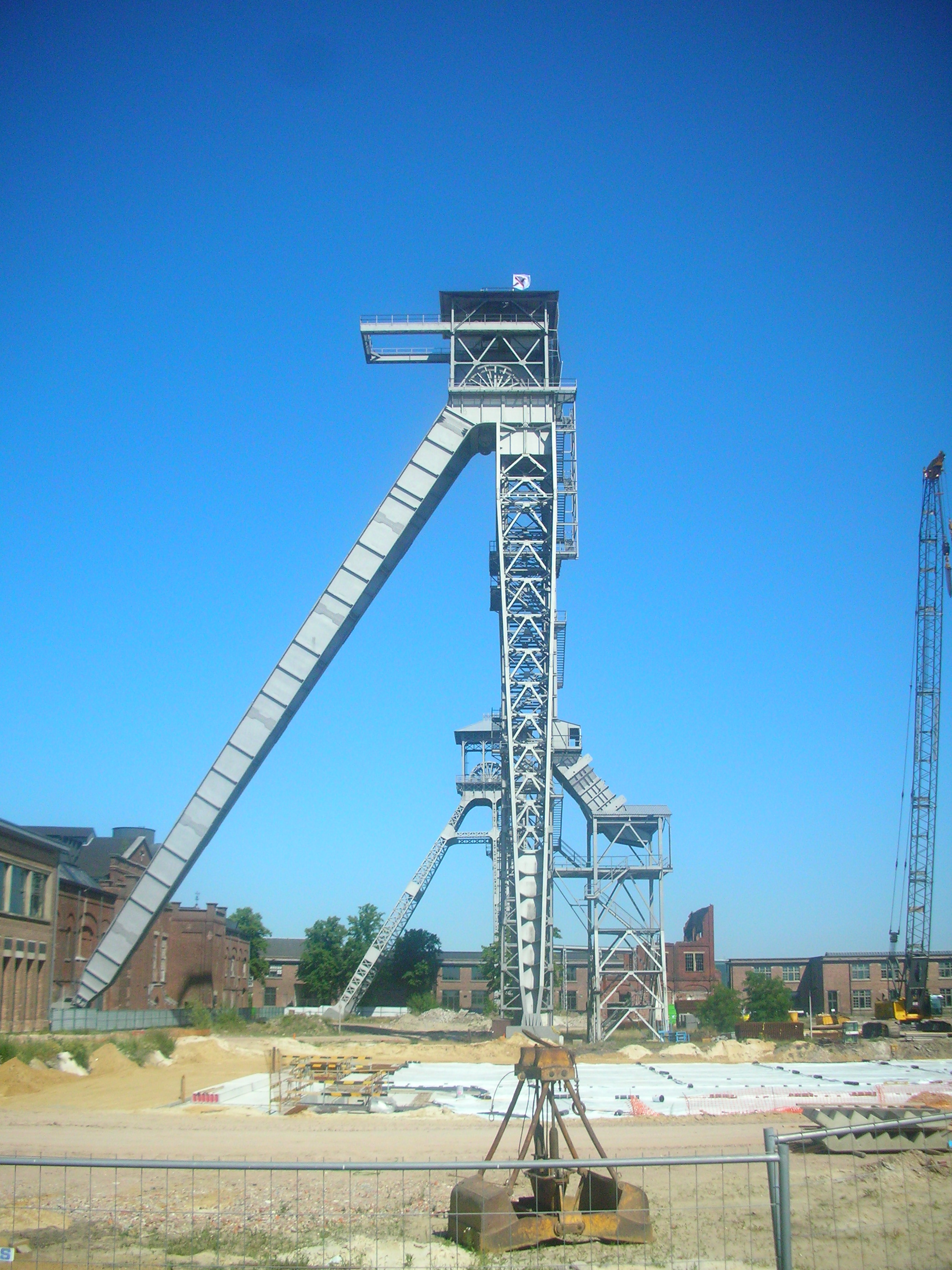 Mijn van Winterslag met de Locatie X-vlag